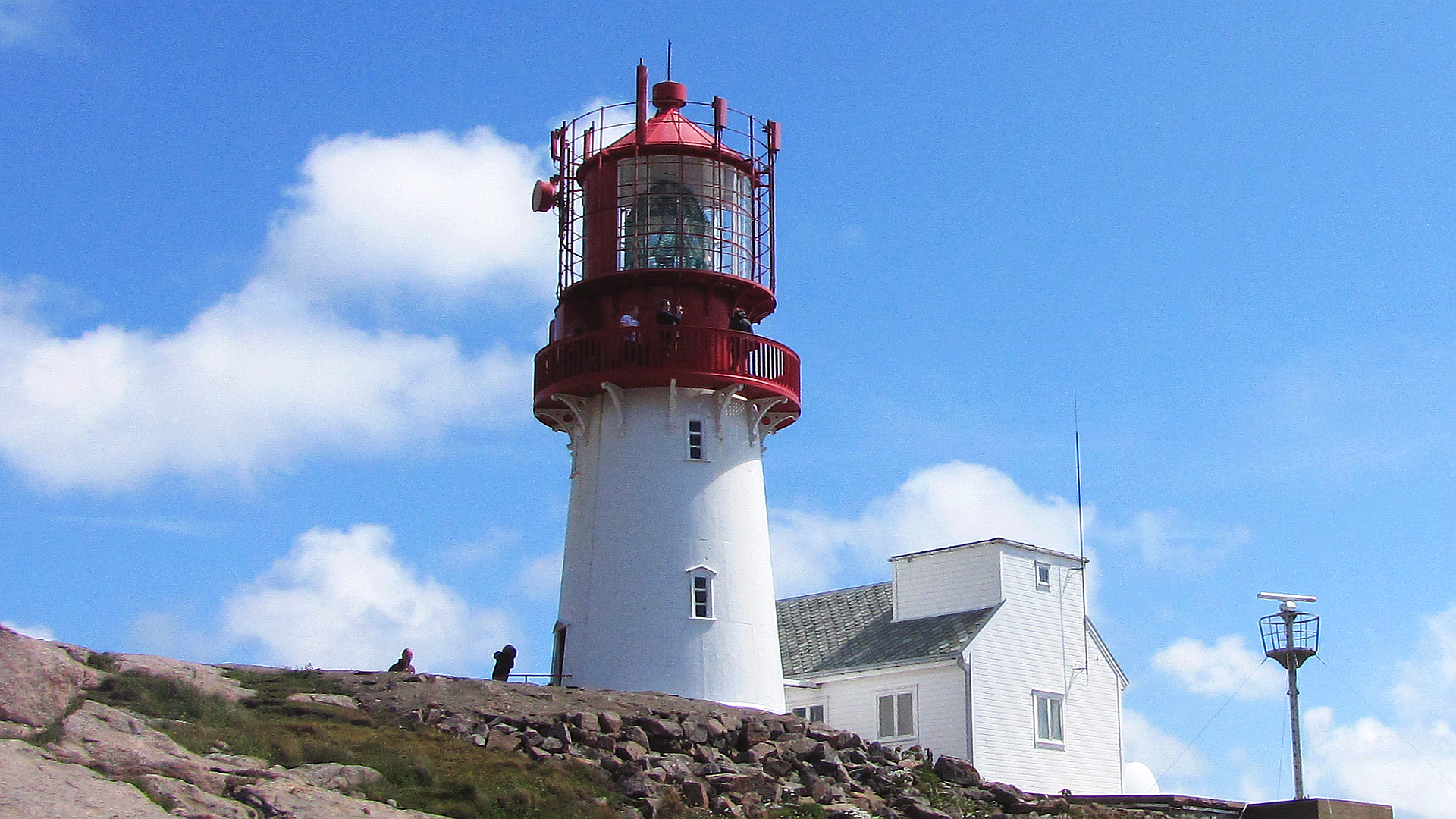 4 Lindesnes Fyr von Westen Lichthöhe 50 m ü NHN Leuchtturm aus Gusseisen 1915 Linse 1854 Rw 19 sm Foto Wolfgang Pehlemann IMG_9543.jpg